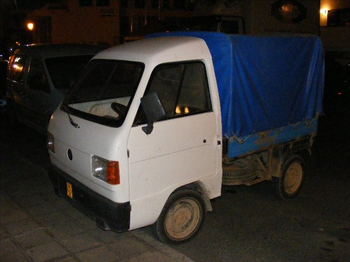 Bellier auf Fuerteventura